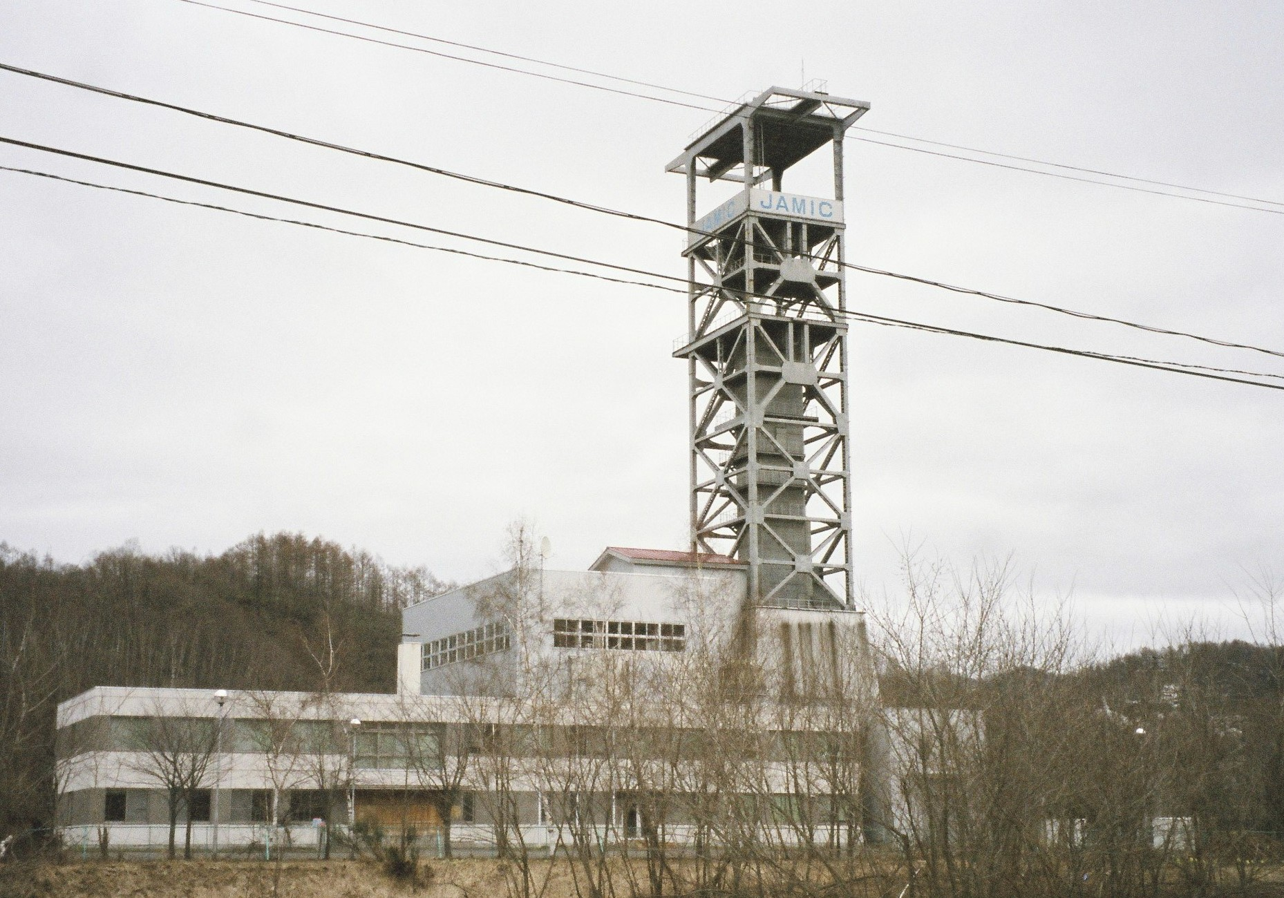 上砂川町にあった地下無重力実験施設（旧三井砂川炭鉱中央立坑櫓）